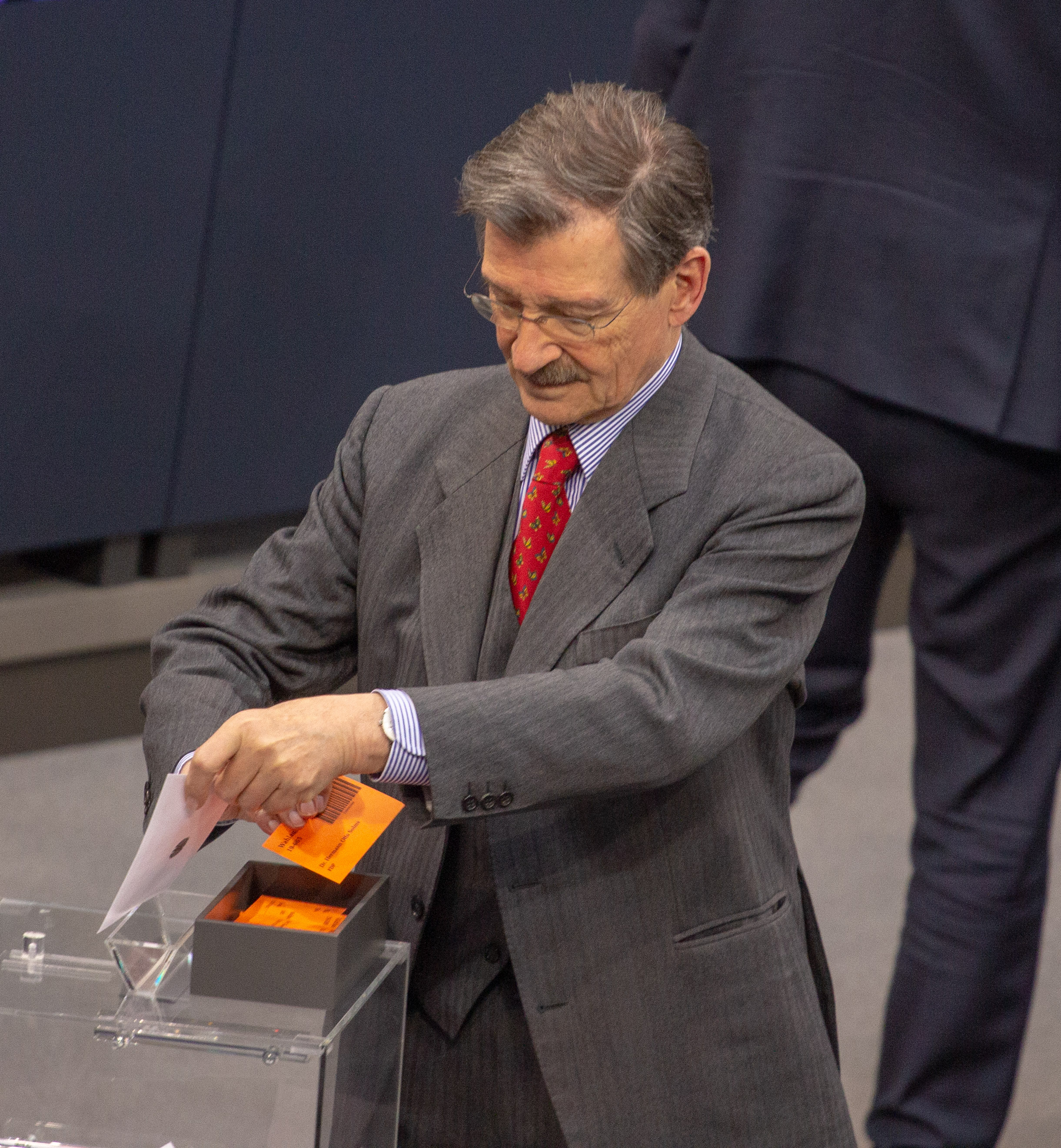 Hermann Otto Solms, Mitglied des Deutschen Bundestages, während einer Plenarsitzung am 11. April 2019 in Berlin.